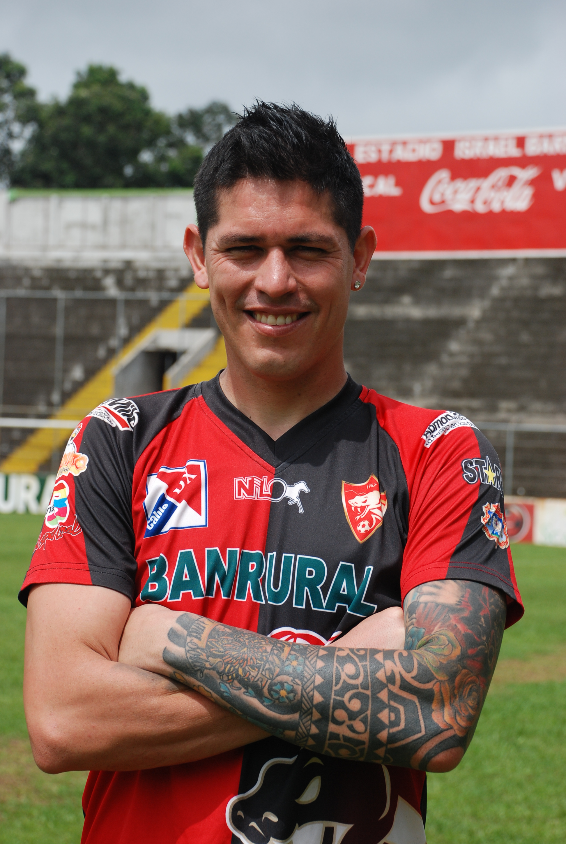 Paulo Centurión en su presentacion con el Club Social y Deportivo Coatepeque